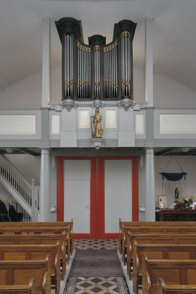 Sint Willibrorduskerk: Interieur, aanzicht orgel, orgelnummer 1212 (opmerking: Gefotografeerd voor Het Historische Orgel in Nederland 1850-1858)